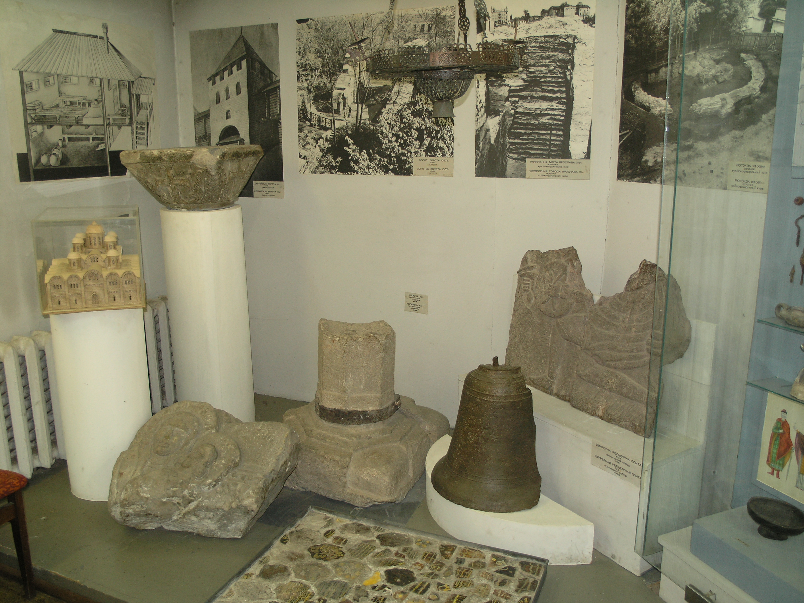 Україна, Київ, Старокиївська гора - Будинок Київської художньої школи ім. Т. Шевченка, де з 1944 р. розміщується Державний історичний музей України, з діяльністю якого і формуванням колекцій пов'язані імена Ернста Ф., Потоцького П., Хвойки В., Біляшівського М., Щербаківського Д. та ін.